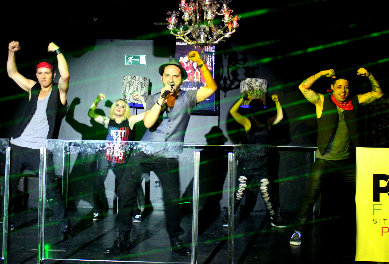 Carlos Nóbrega Singer Actor Show Tour Gira